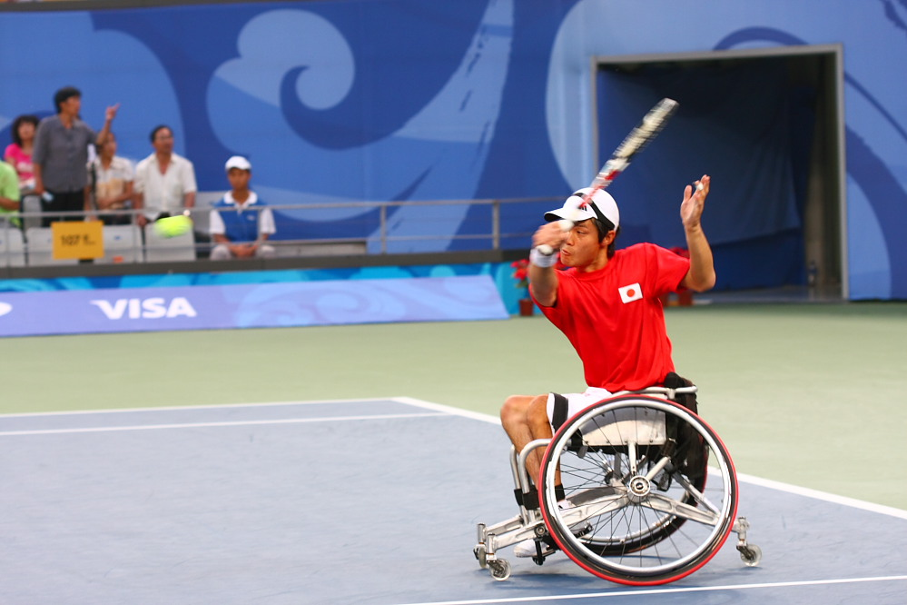 2008北京残奥会的轮椅网球赛之四--男子双打季军争夺